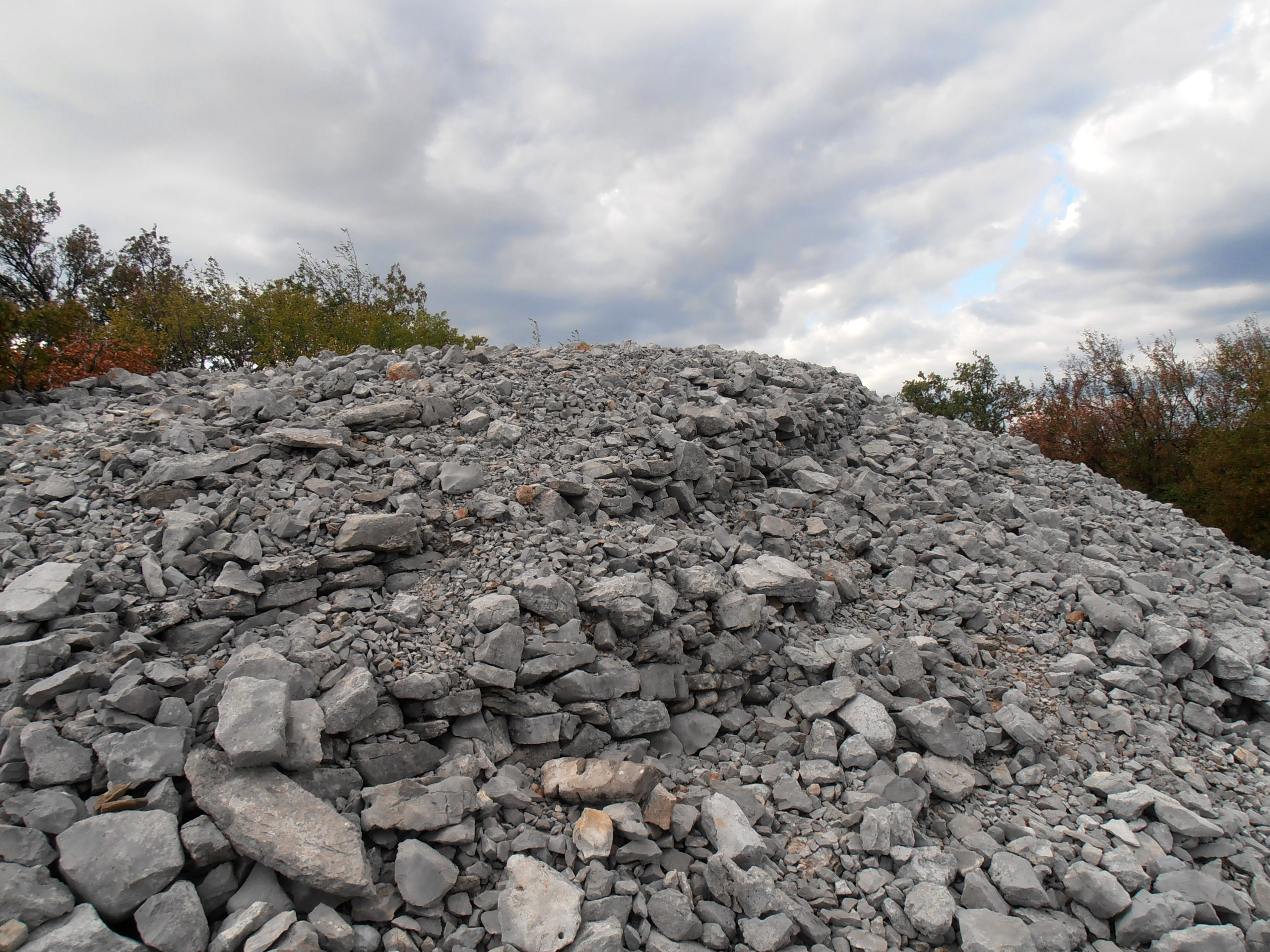 Italia – Trieste – Slivia - Il castelliere